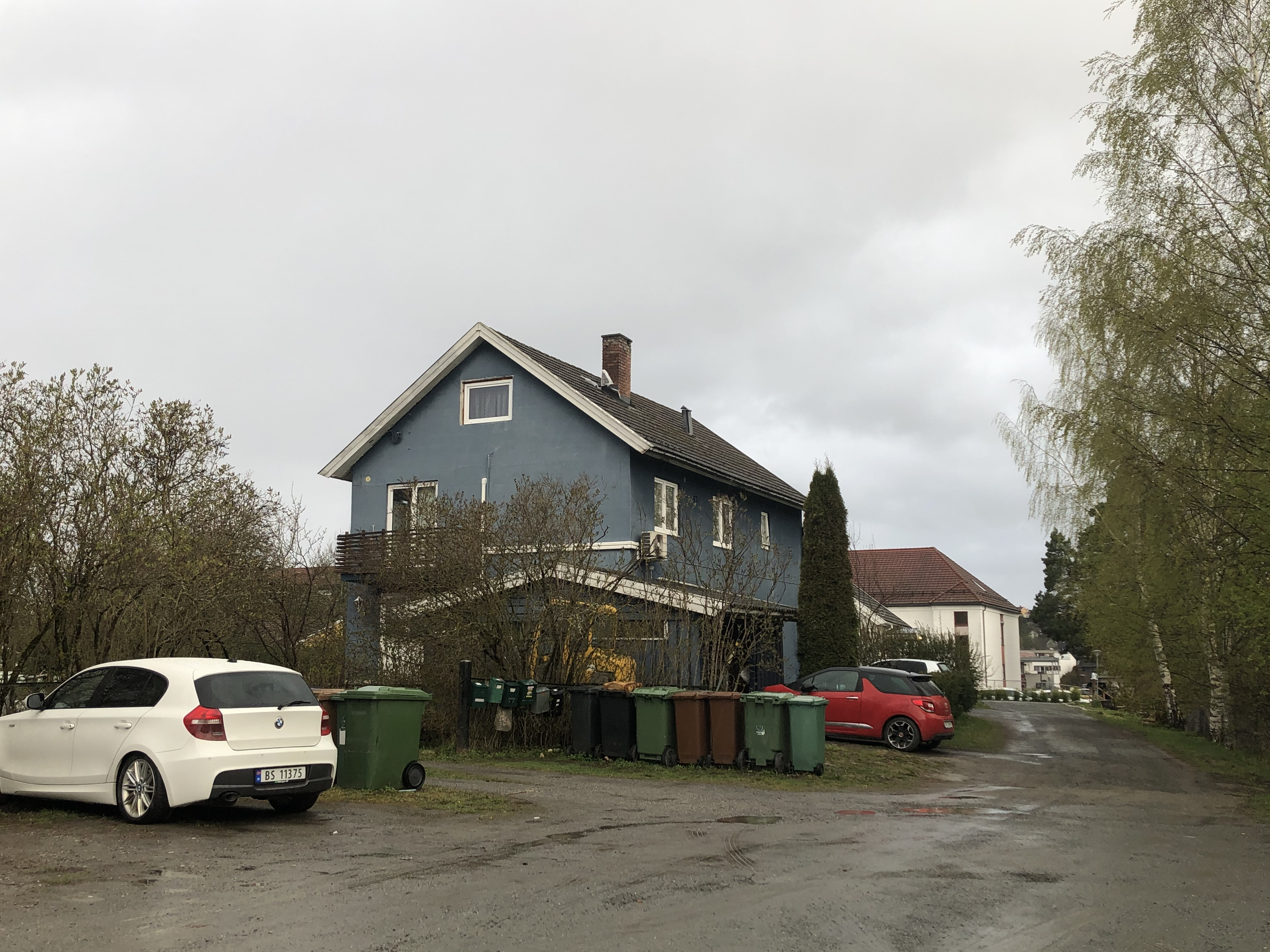 Vestvangveien, Ringerike. I bakgrunnen skimtes Hønefoss Omsorgssenter.